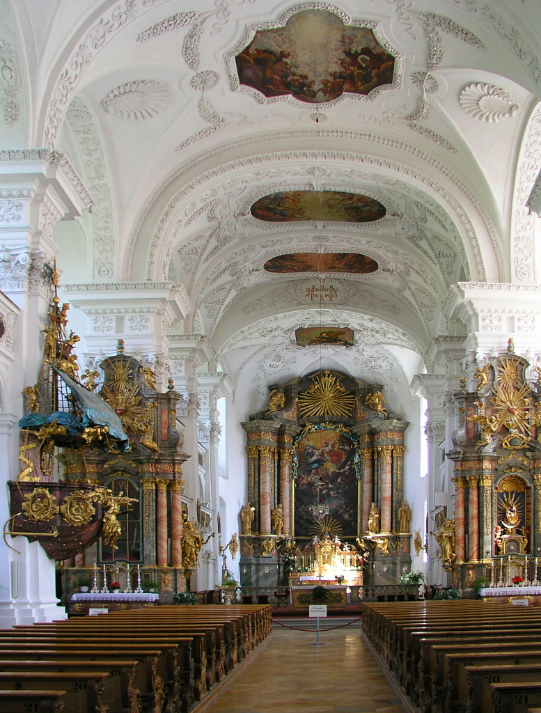 Blick zum Chor, ehemalige Klosterkirche der Abtei Irsee in Irsee, Landkreis Ostallgäu, Bayern.